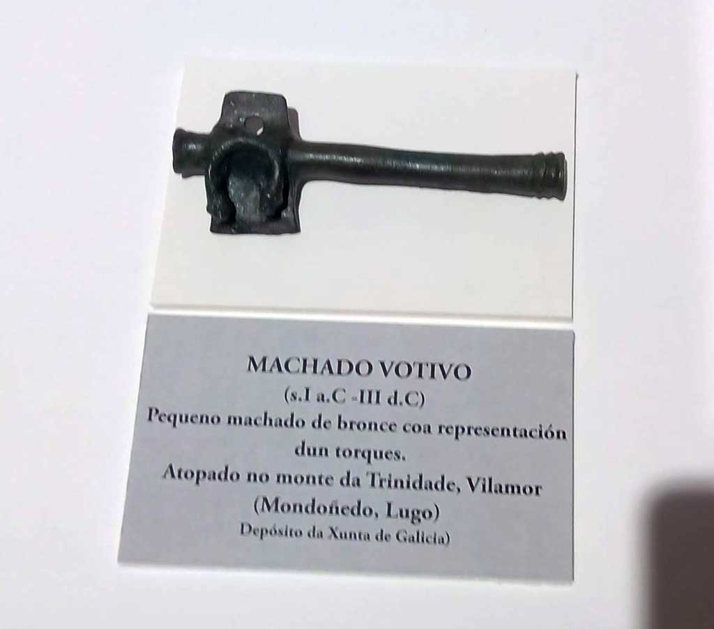 Machado votivo de Castro Trinidade, Mondoñedo. No Museo do Castro de Viladonga.